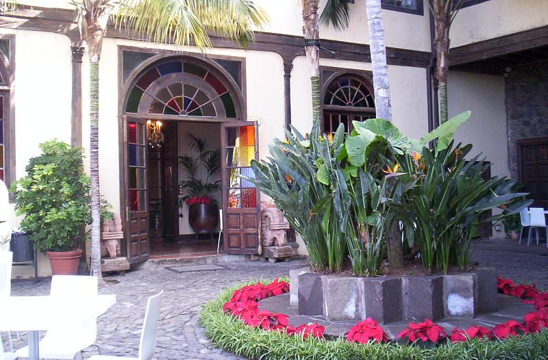 Patio interior en Casa Lercaro, La Orotava, Tenerife, Canarias